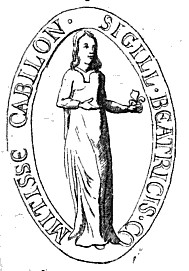 Beatrix z Albonu